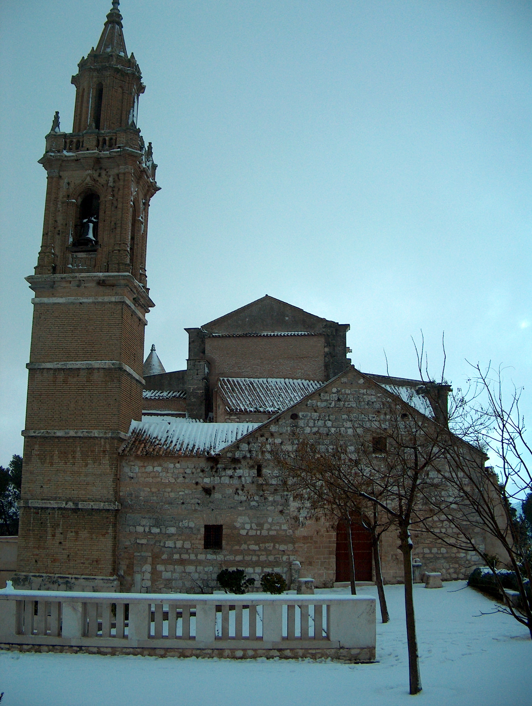 Iglesia de Sta. María en Estepa, el día de la nevada.